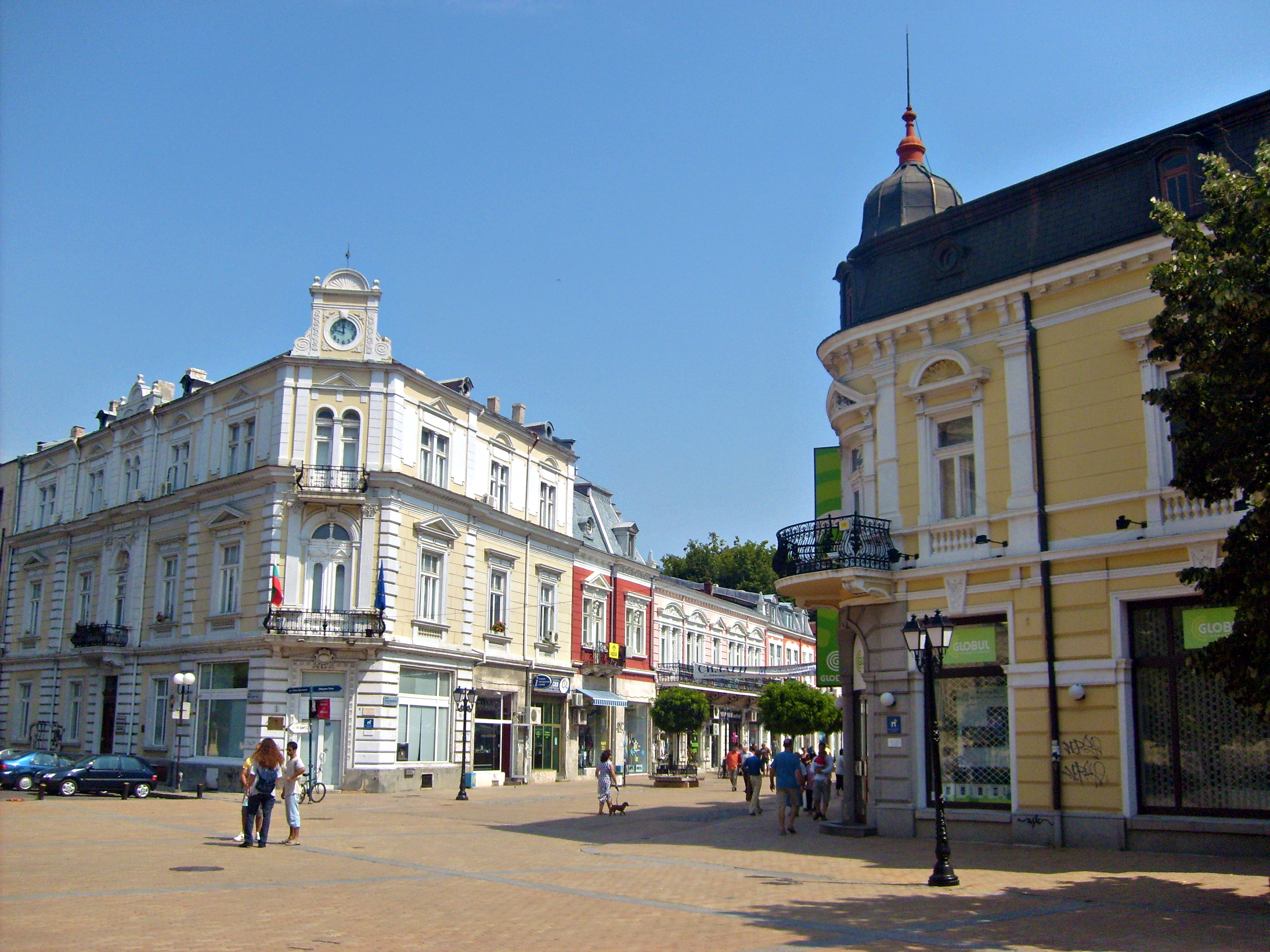 Ruse, Bulgaria Girdap Bank